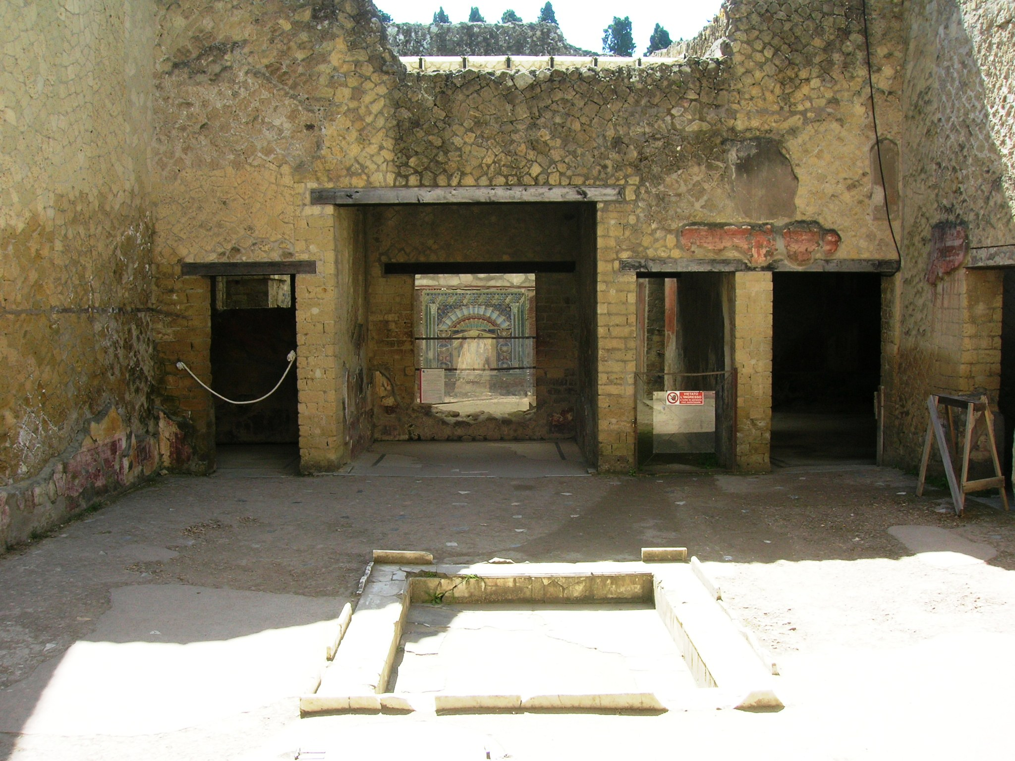 Casa di Nettuno e Anfitrite